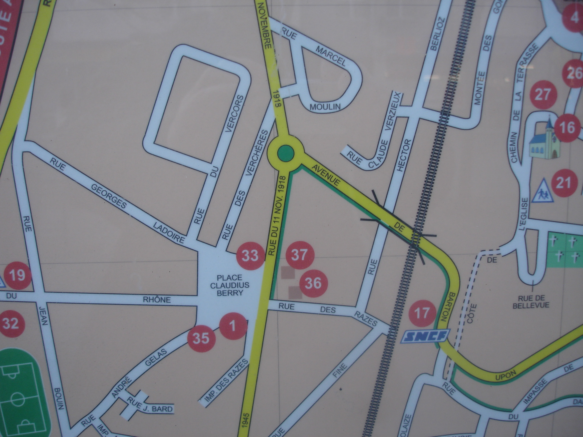 Feyzin : carte de Feyzin-le-bas